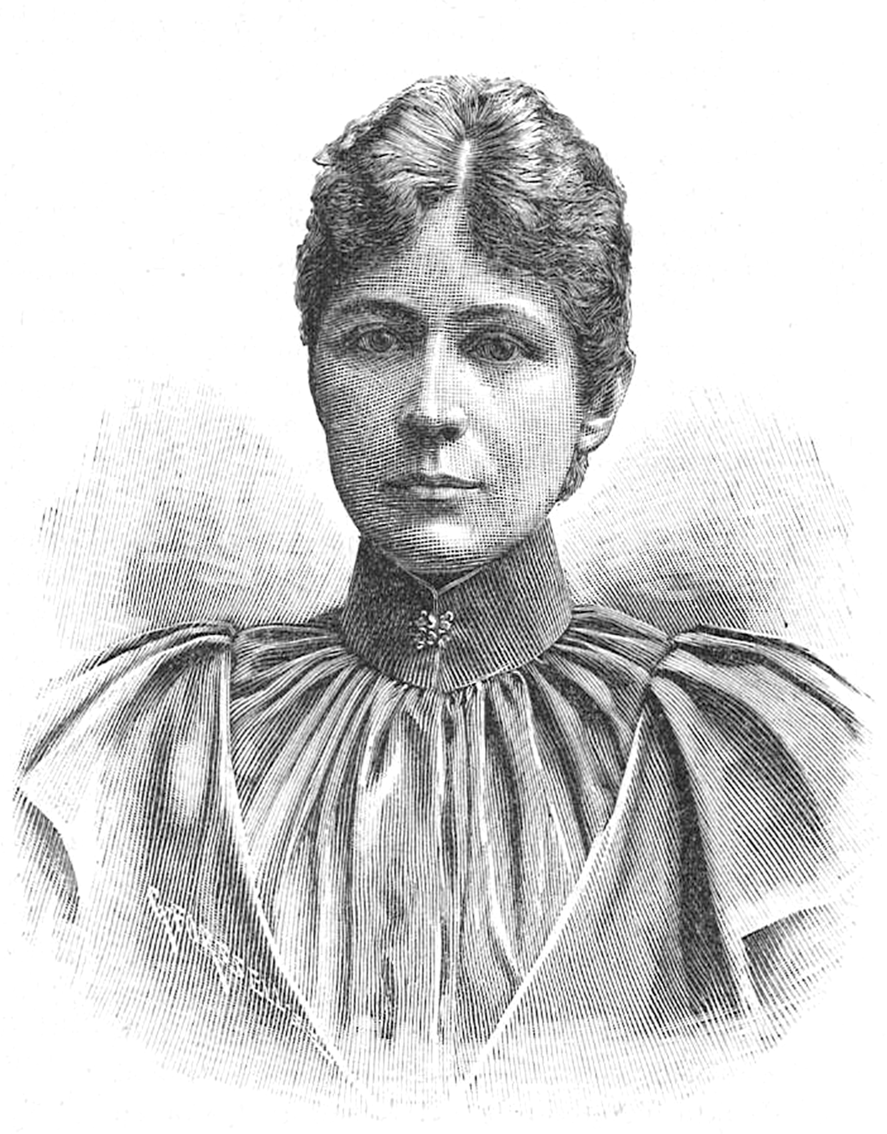 Ellen Lundberg-Nyblom (1869-1933)